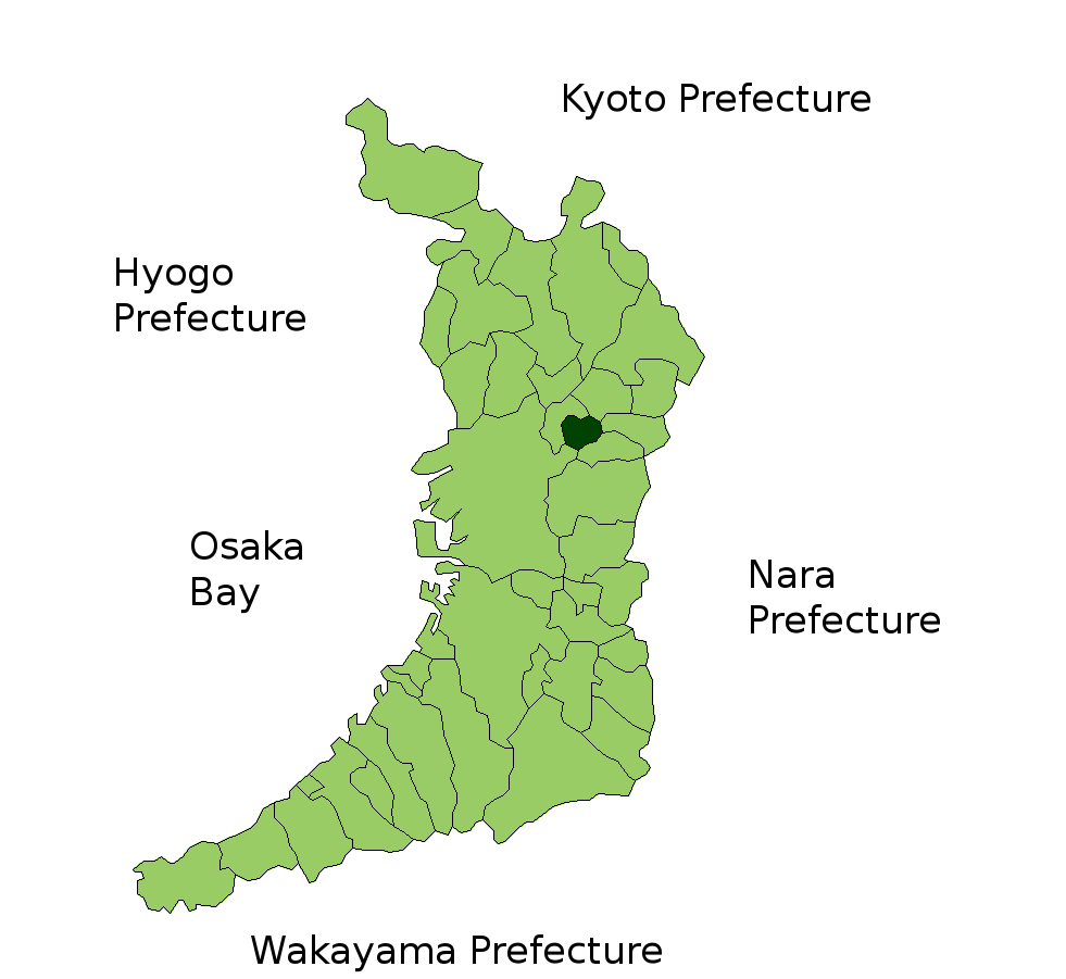 Location Map of Kadoma in Osaka-fu, Japan